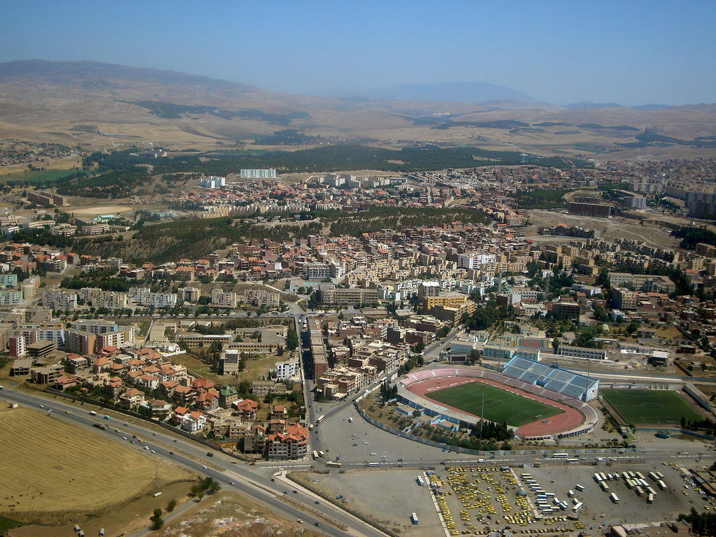 Vue aérienne sur la ville de Sétif (Algérie)